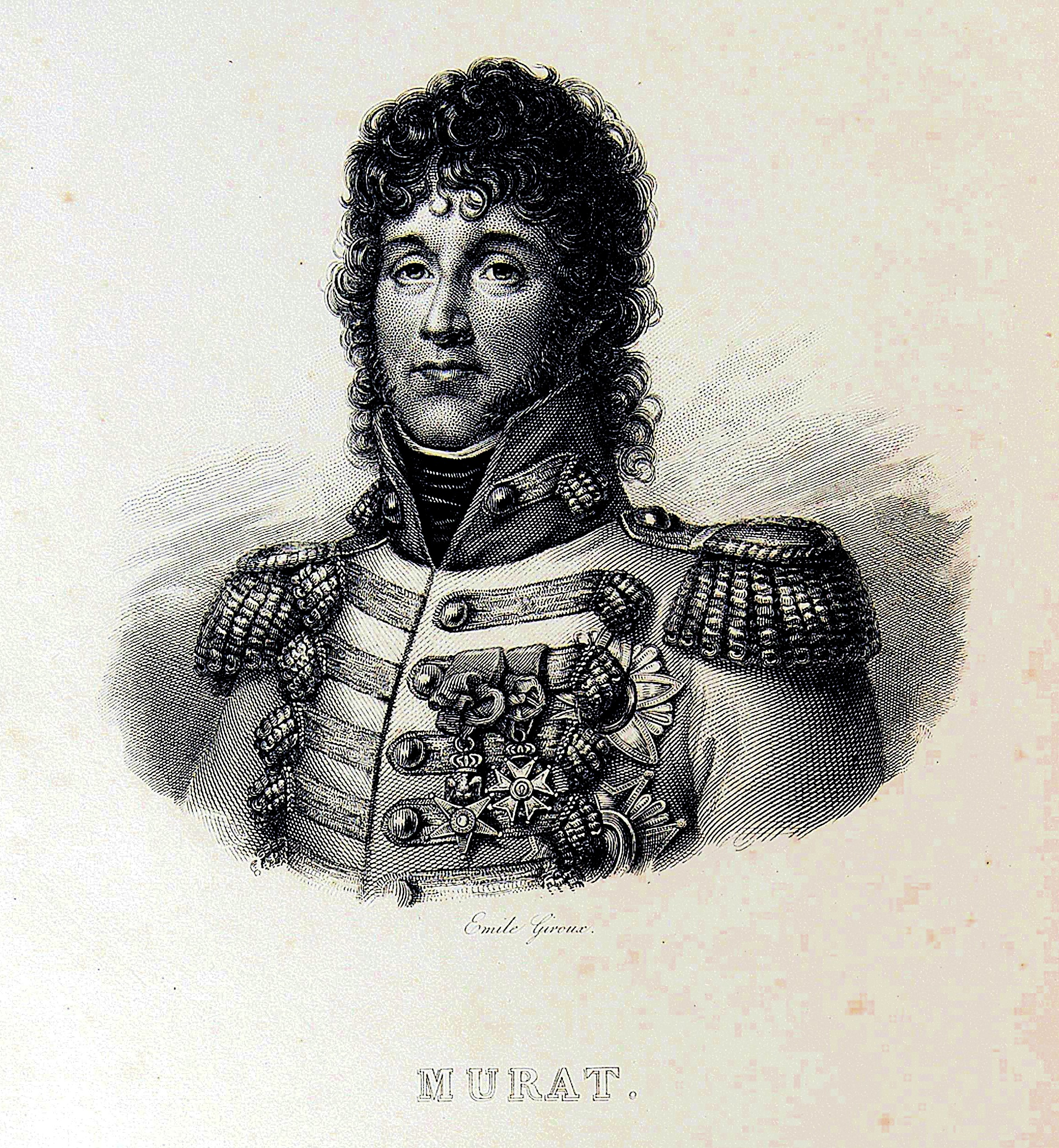 Joachim Murat. l’illustration de l’Histoire de Napoléon de Norvins, publiée en 1839.